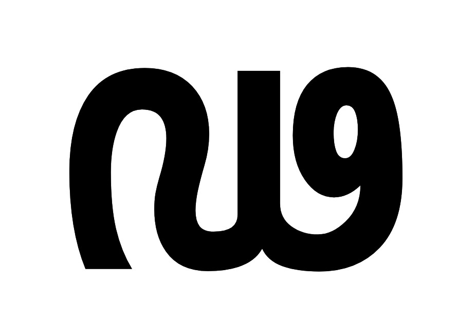 ഢ മലയാളം അക്ഷരം